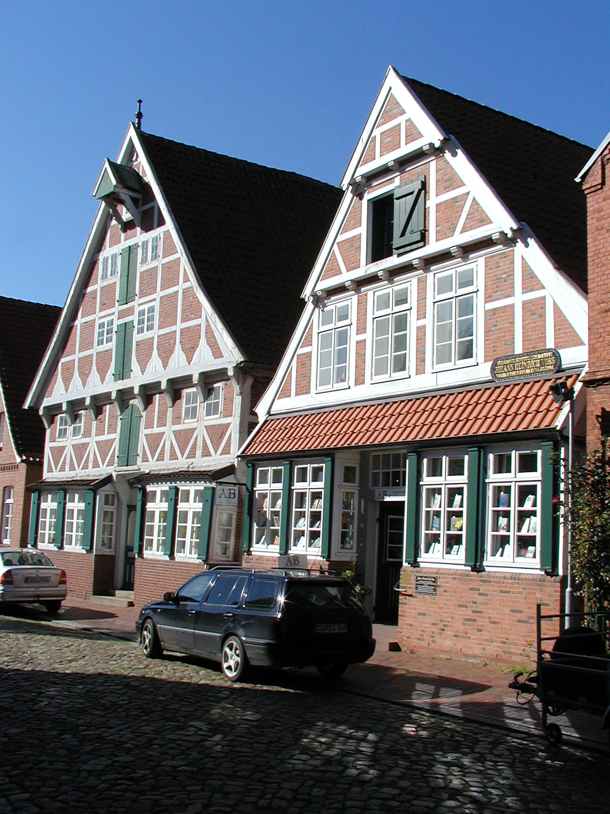 Hier wohnte der Rektor Voß